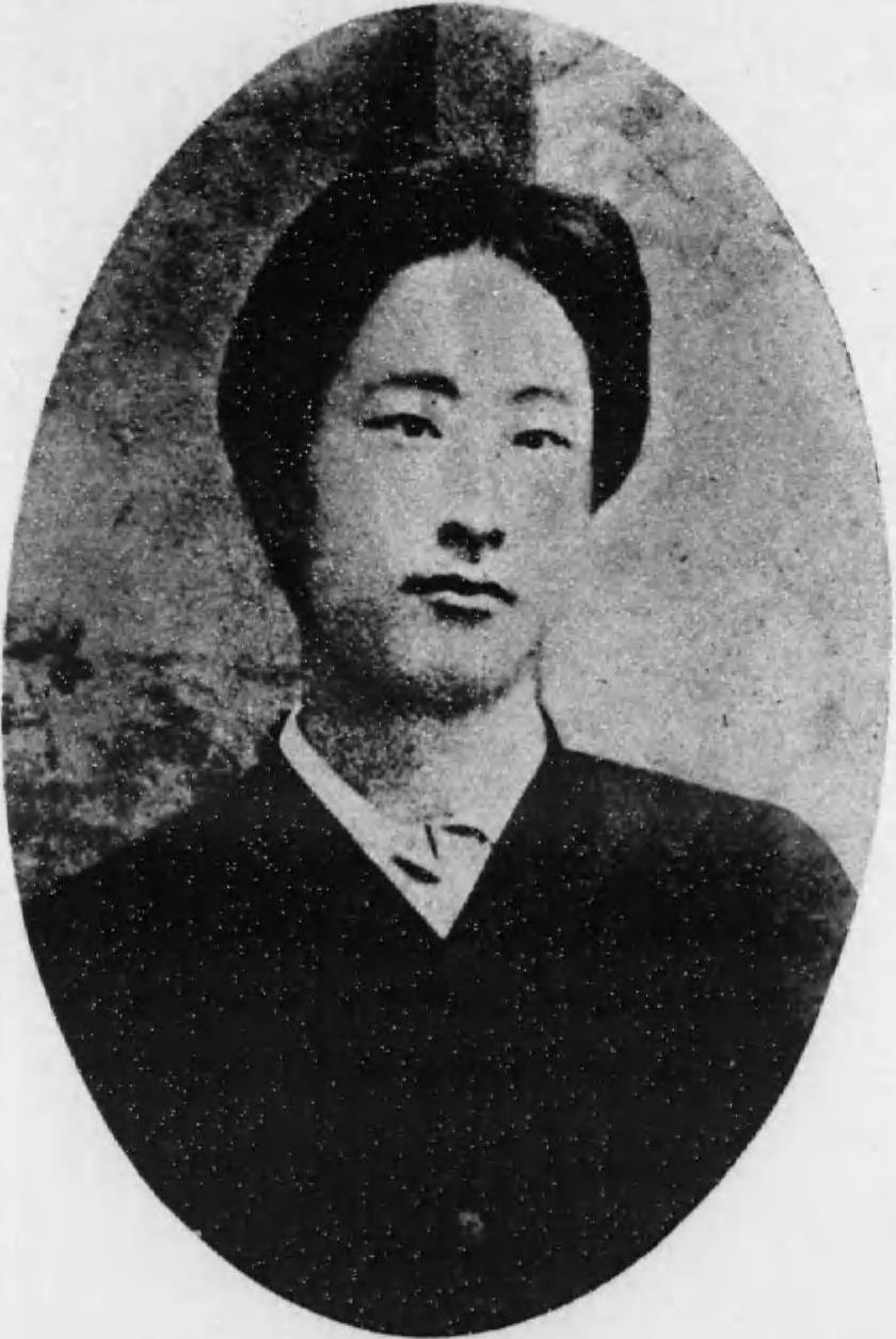 在漢口時代の浦敬一